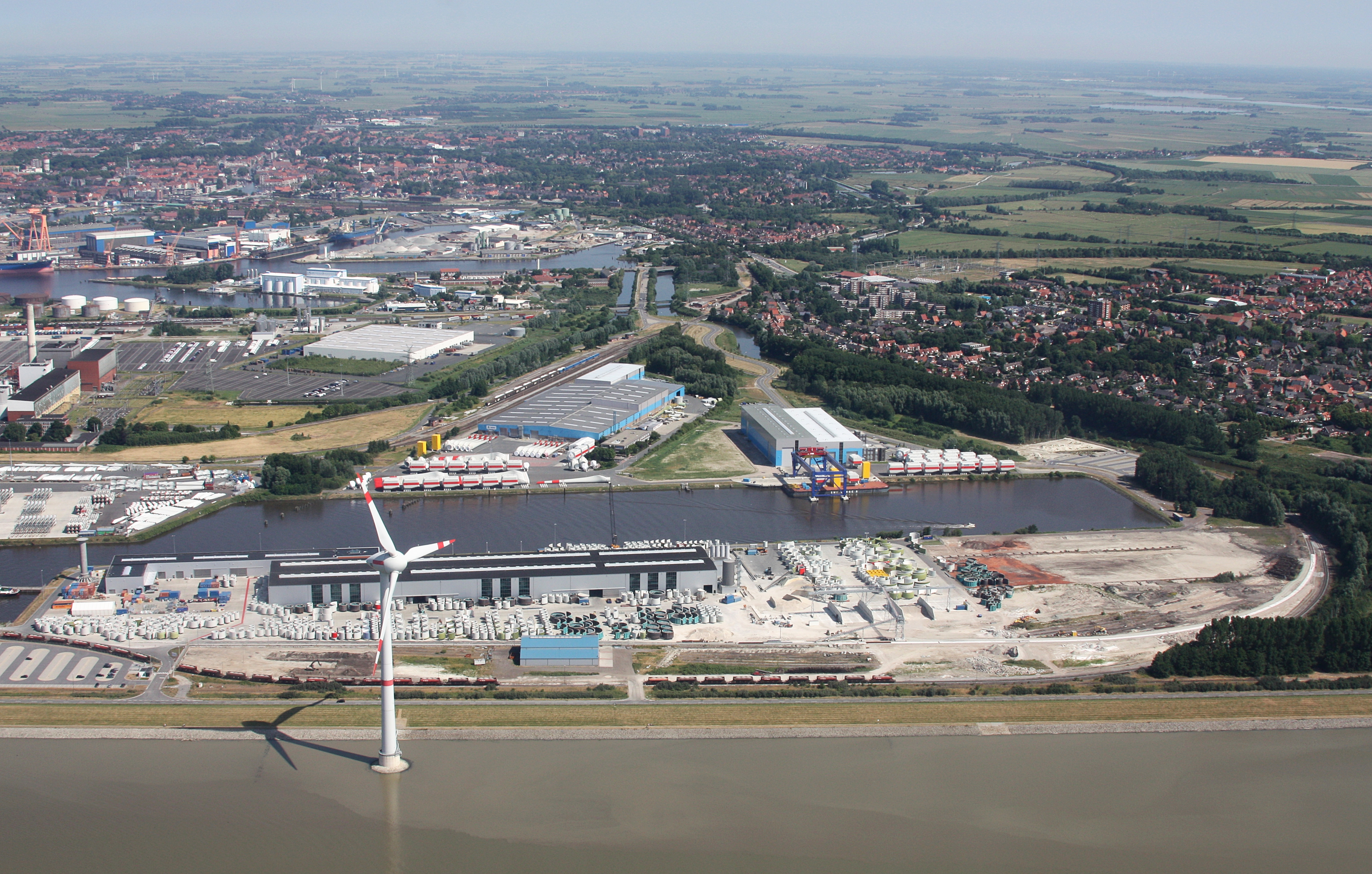 Flug über Emden; Flughöhe 1500 ft; Juli 2010; Originalfoto bearbeitet: Tonwertkorrektur und Bild geschärft mit Hochpassfilter